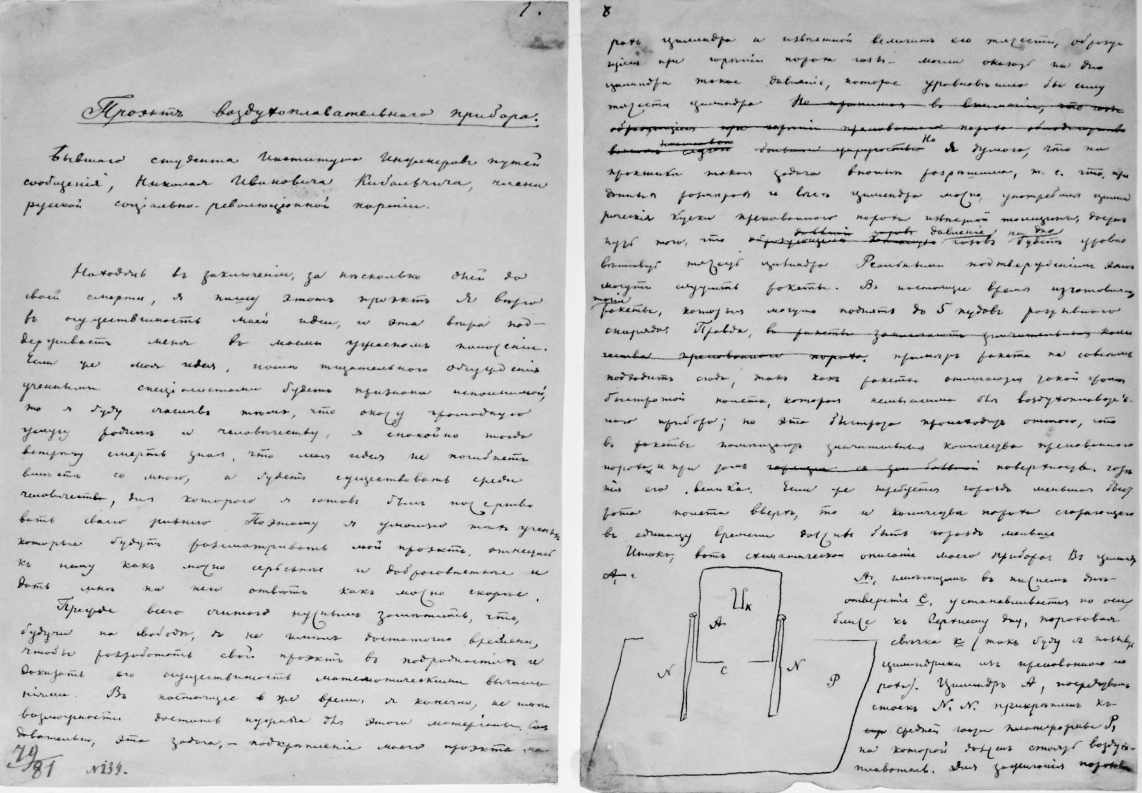 La lettera in cui Kibal'cic descrive il suo progetto di dispositivo aeronautico